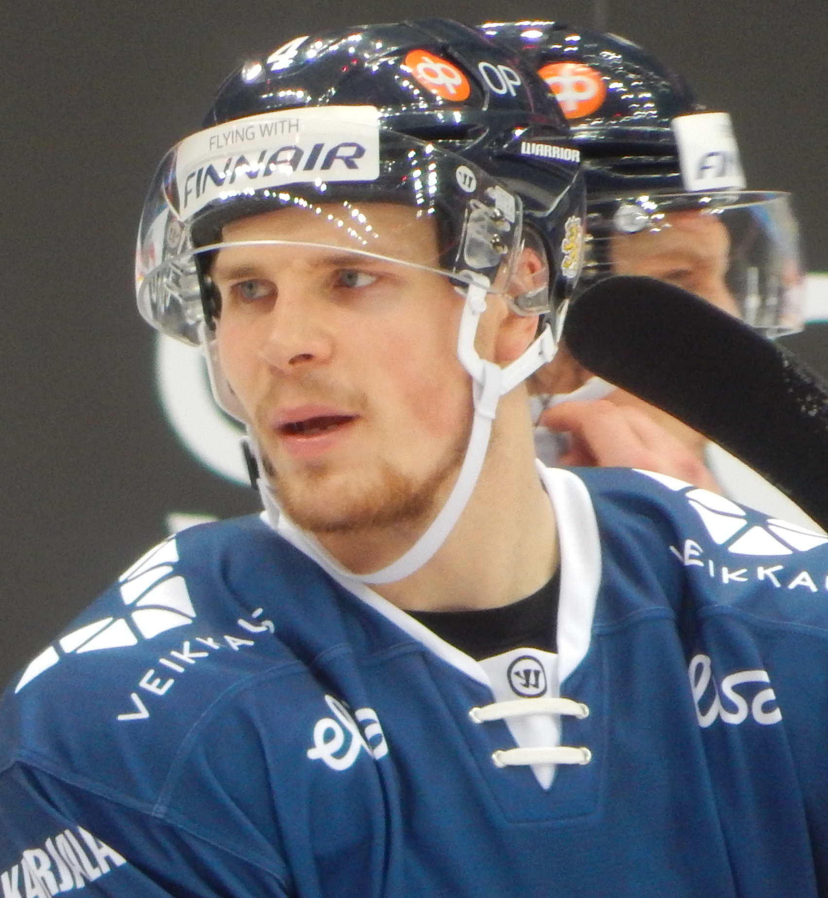 Кубок Первого Канала 2017, матч Финляндия - Южная Корея (15 декабря 2017) 4 LEHTONEN,Mikko ?